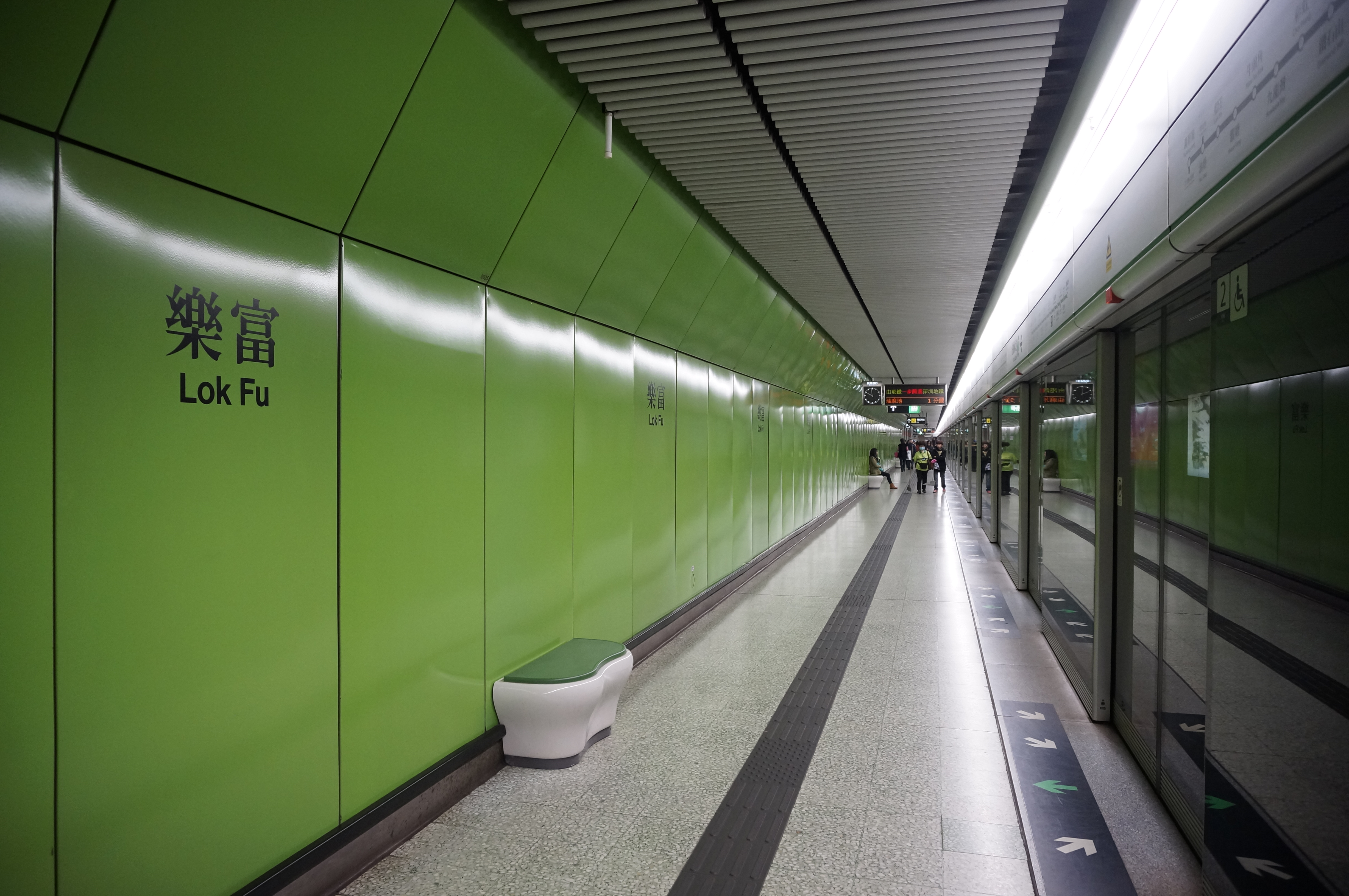 港鐵樂富站月台